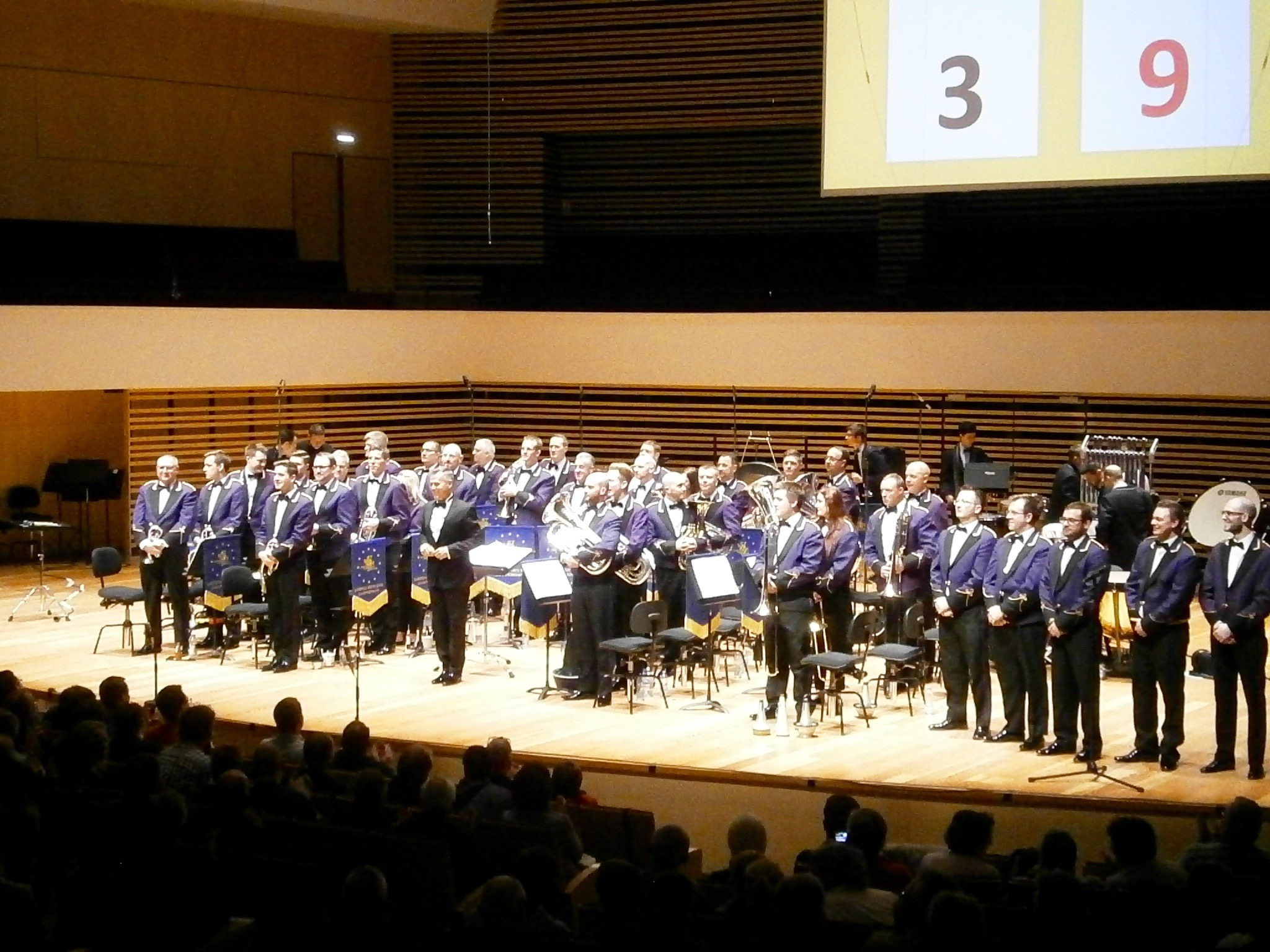 Brighouse & Rastrick Band